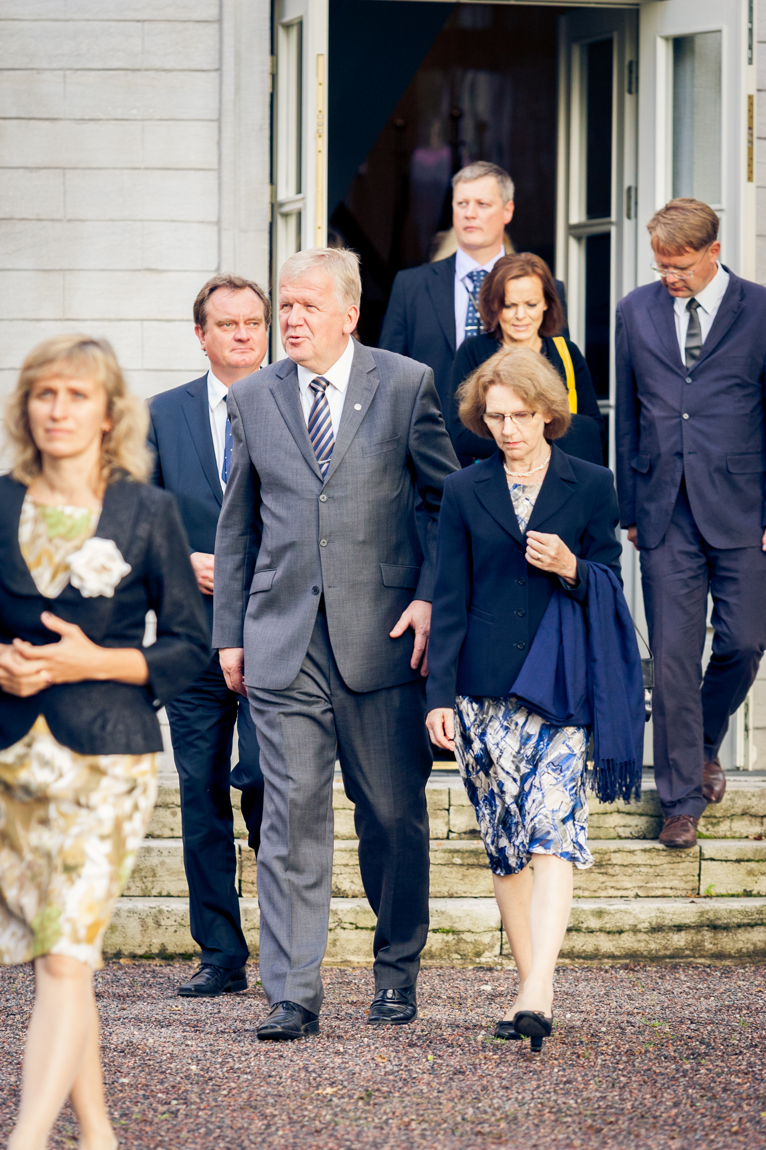 Mati Vaarmann (Eesti suursaadik Lätis) ja Meelike Palli (välisministeeriumi siseauditi osakonna peadirektor).